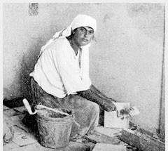 הניה פקלמן בעבודת ריצוף